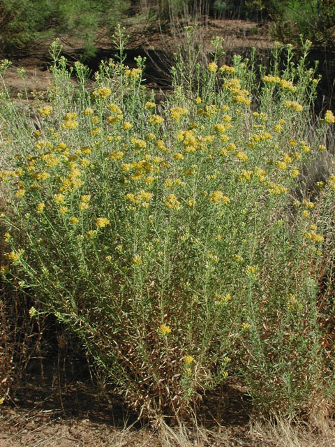 Isocoma acradenia — Alkali Goldenbush. In Maricopa County, Arizona.